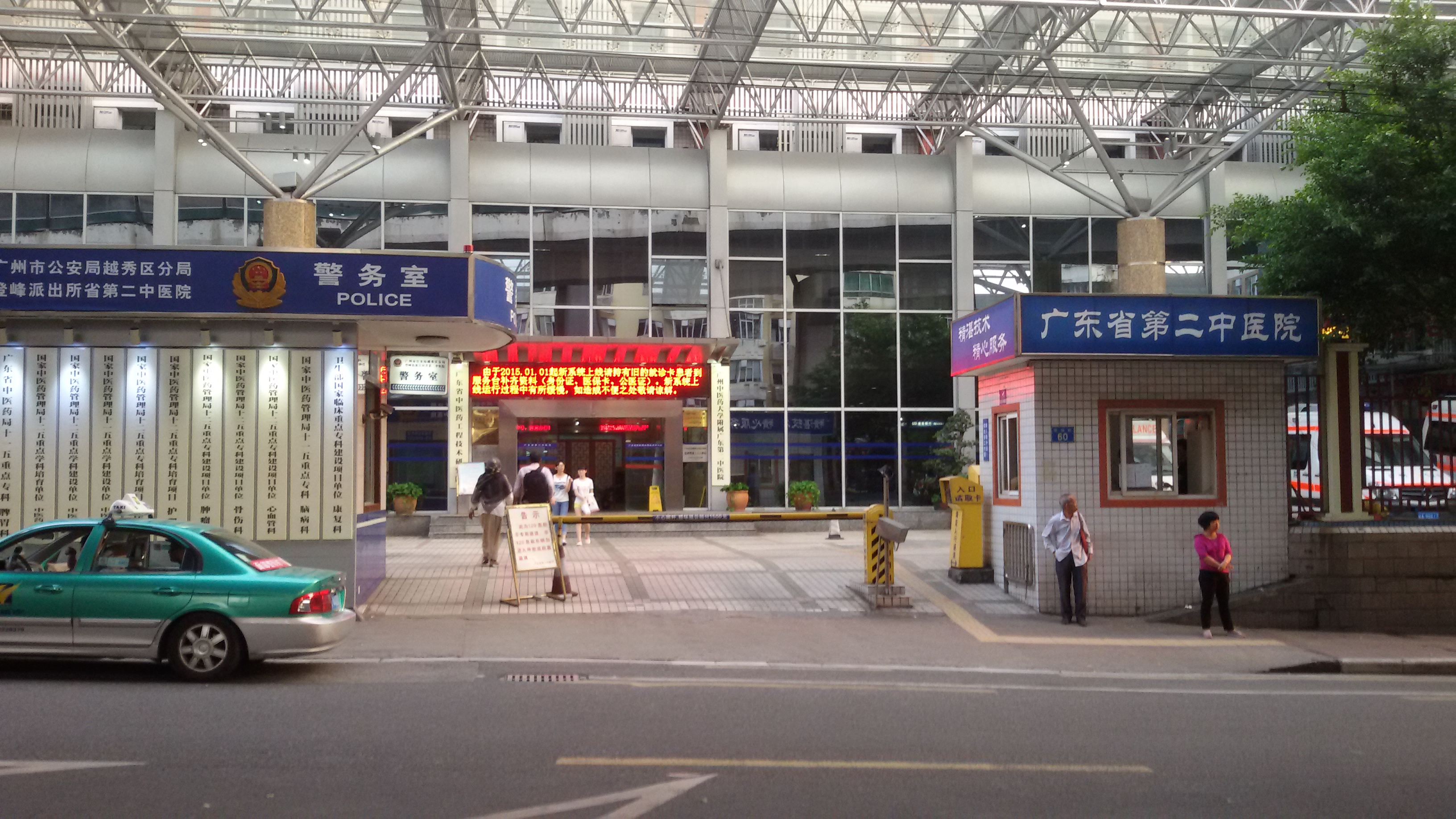 粵語: 广东省第二中医院